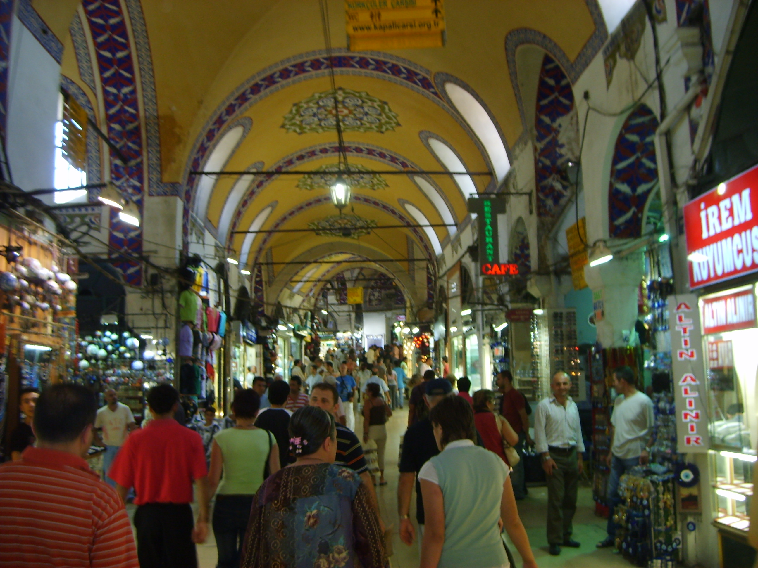 bana ait Kategori:İstanbul resimleri